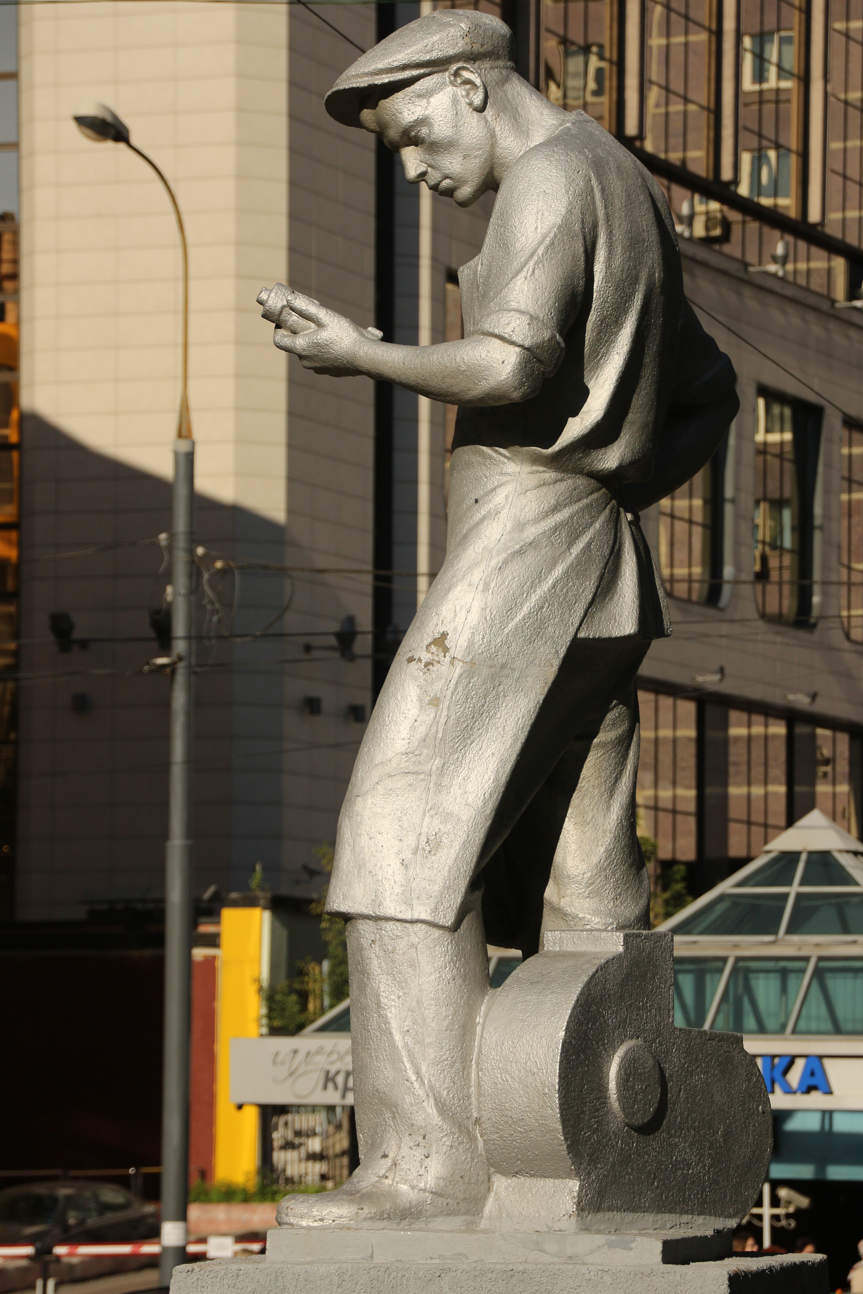 Скульптура «Рабочий»: Крестьянской заставы пл., Таганский, Центральный округ, Москва